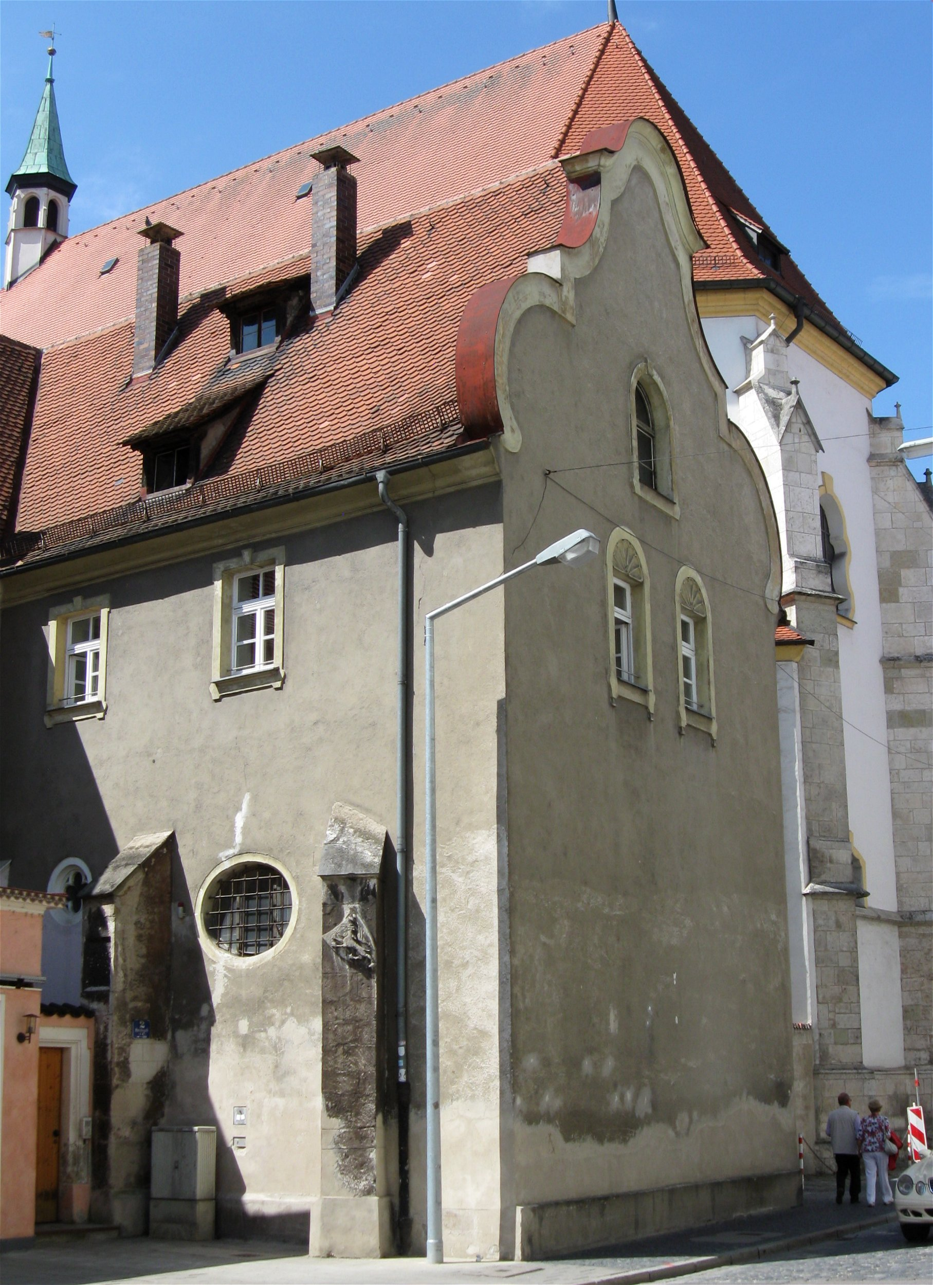 Drei-Kronen-Gasse 1, Speichergasse 2; Mesnerhaus der Alten Kapelle, ehem. Getreidekasten, traufständiges und dreigeschossiges Satteldachhaus, als Getreidekasten erstmals 1240 erwähnt, bez. 1694, 1899 zum Mesnerhaus umgebaut; Zantkapelle, zweijochige gotische Grabkapelle, bez. 1299, Giebel neubarock, 1897